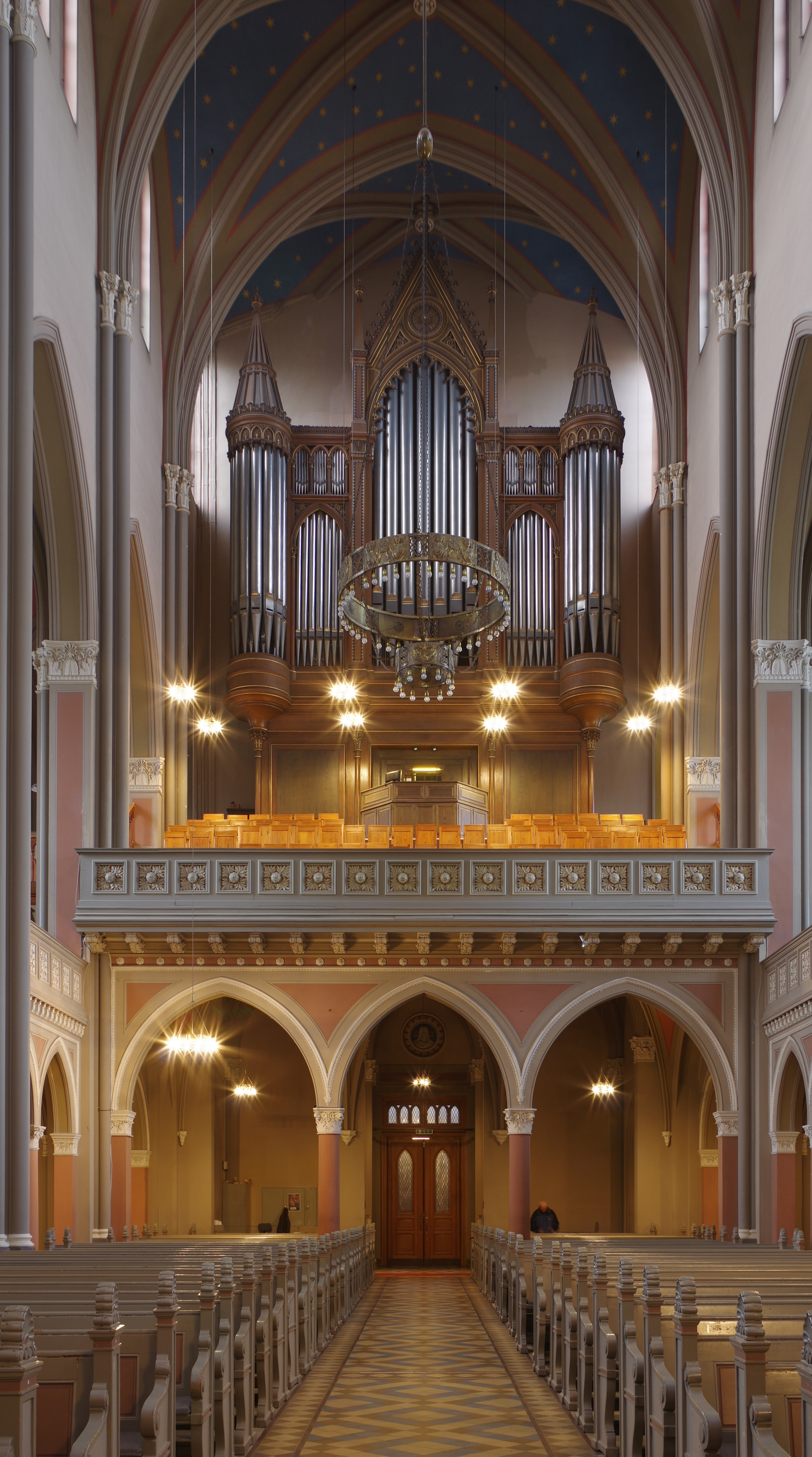 Deutschland, Wiesbaden, Marktkirche